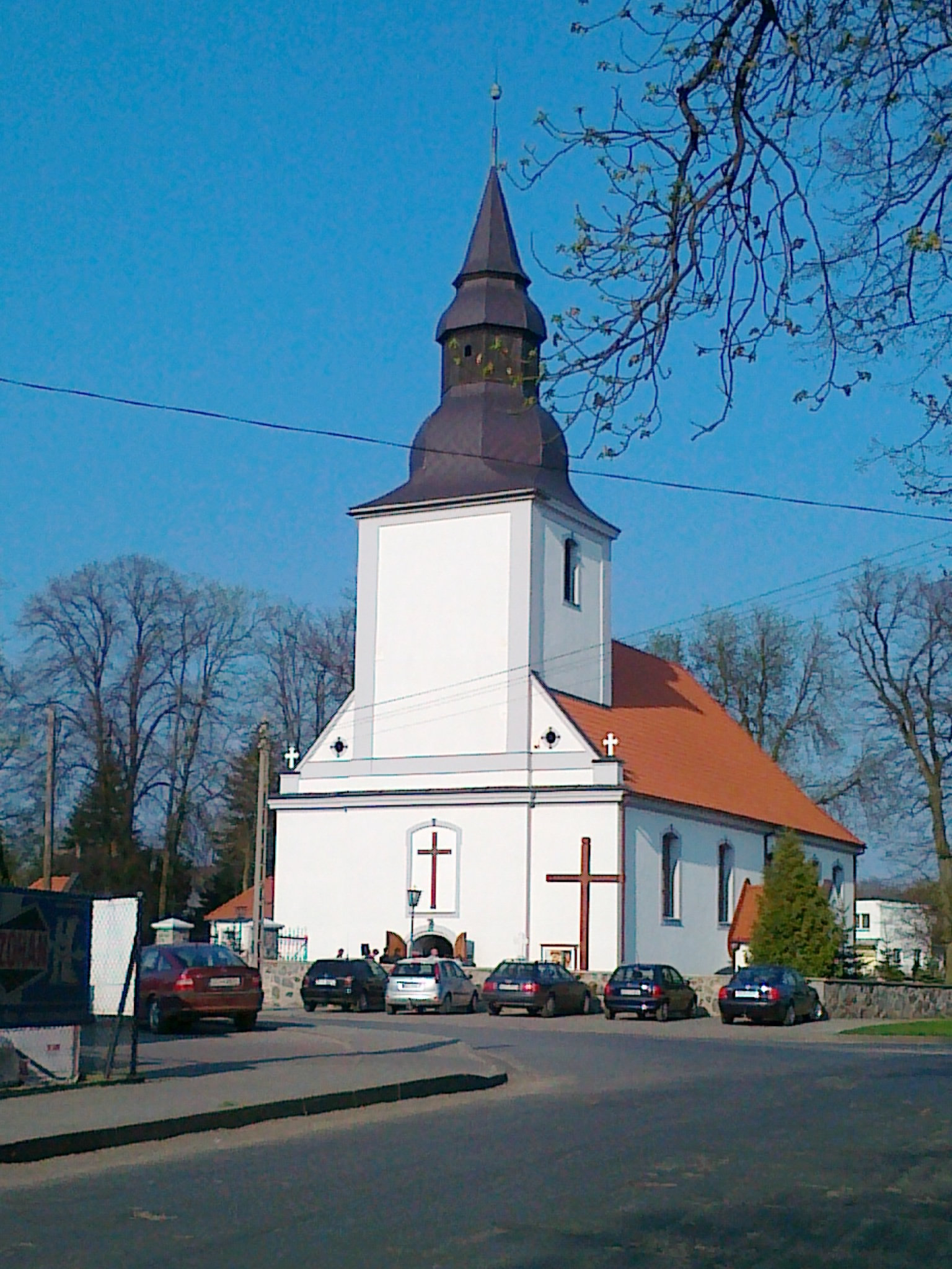 Konarzyny - rzymskokatolicki kościół parafialny p.w. śś. Piotra i Pawła, 1731